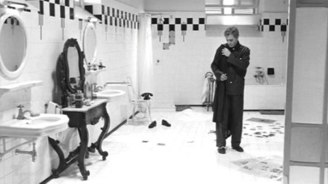 Screenshot del film 8½ (1963)